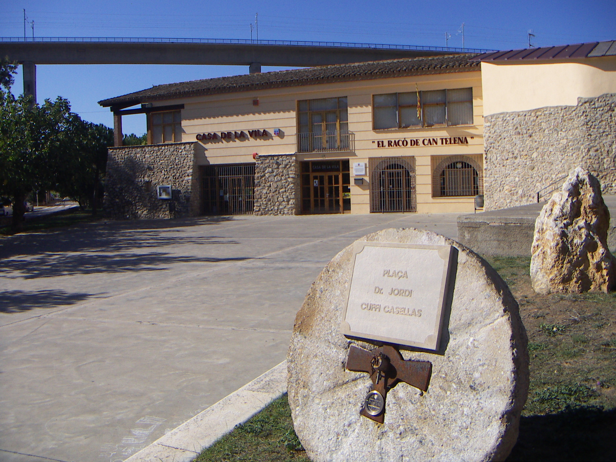 Edifici de can Telena, seu de l'Ajuntament, dispensari i local social i de joves de Pont de Molins.